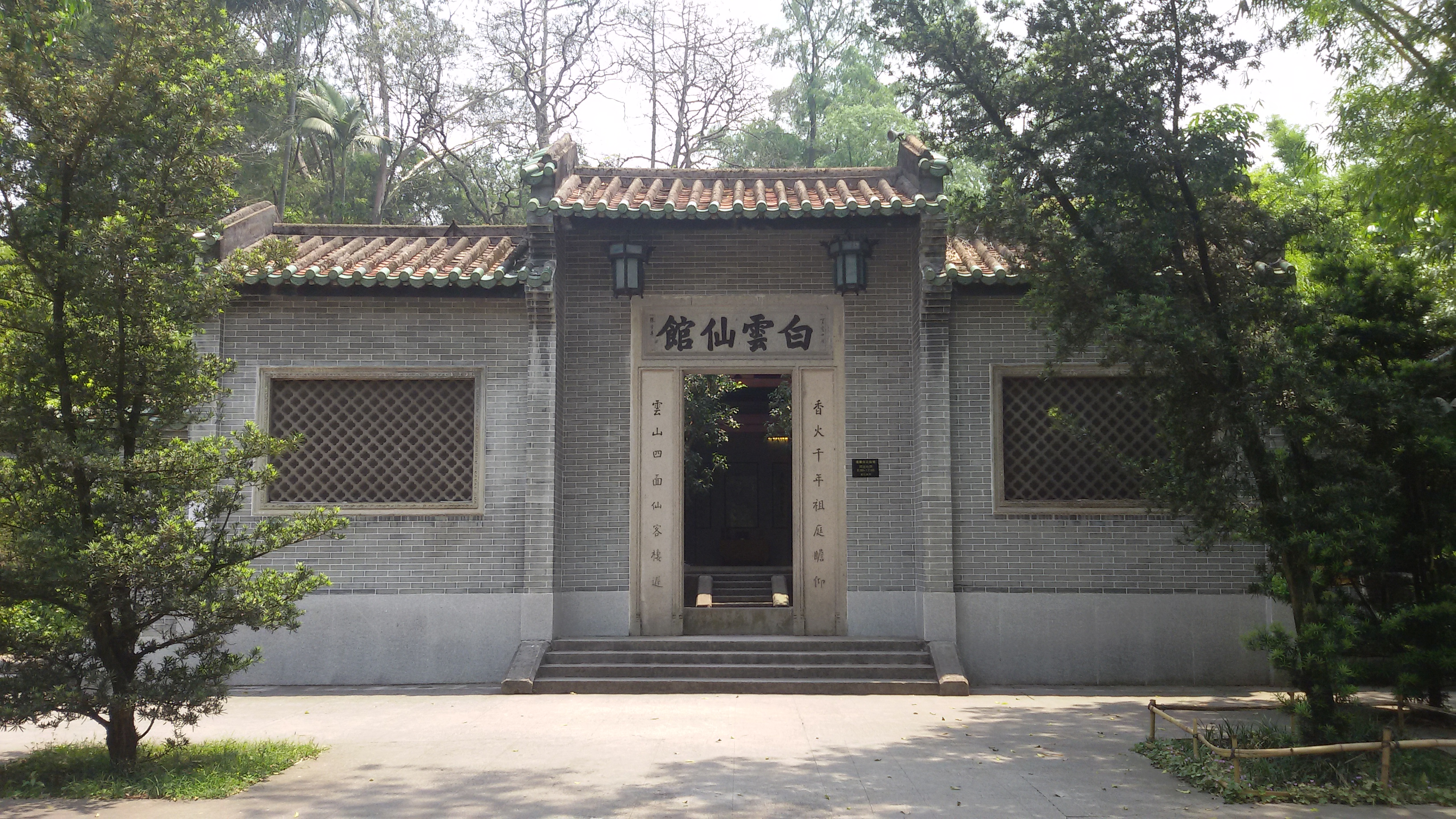 粵語: 麓湖公园嘅白雲仙館景區